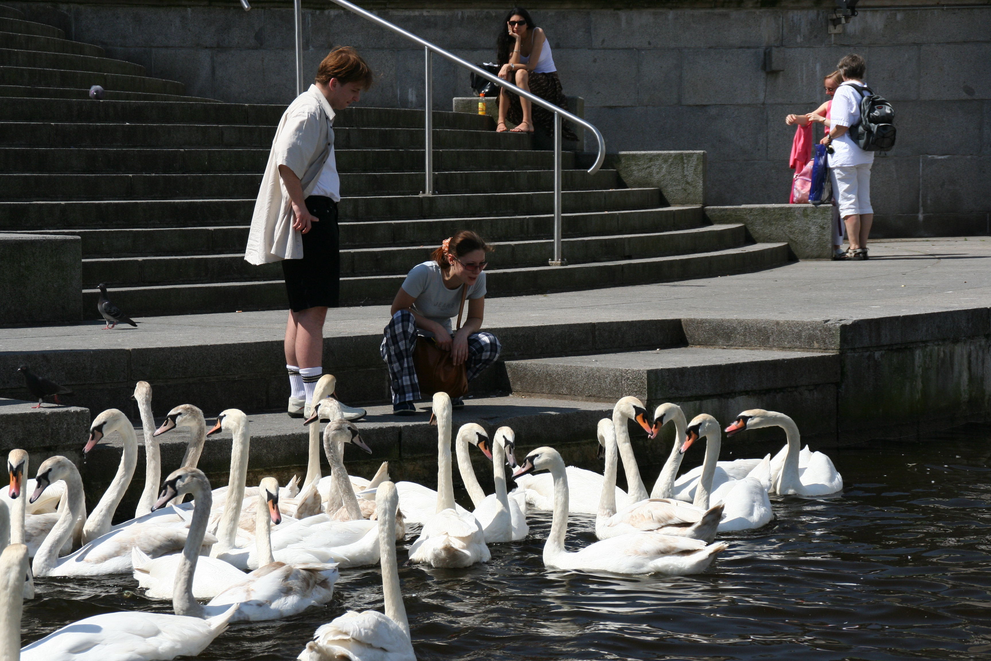 Alsterschwäne an der kleinen Alster vor dem Rathausmarkt, Hamburg.